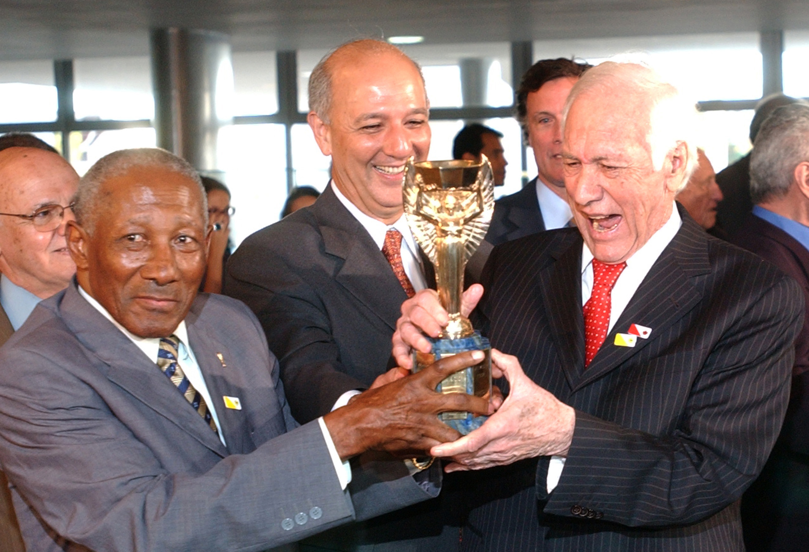 O ex-jogador Djalma Santos, o governador do Distrito Federal, José Roberto Arruda, e o ex-capitão da Seleção de 58, Bellini, seguram a Taça Jules Rimet durante inauguração de exposição em homenagem aos 50 anos da conquista da primeira Copa do Mundo pelo Brasil